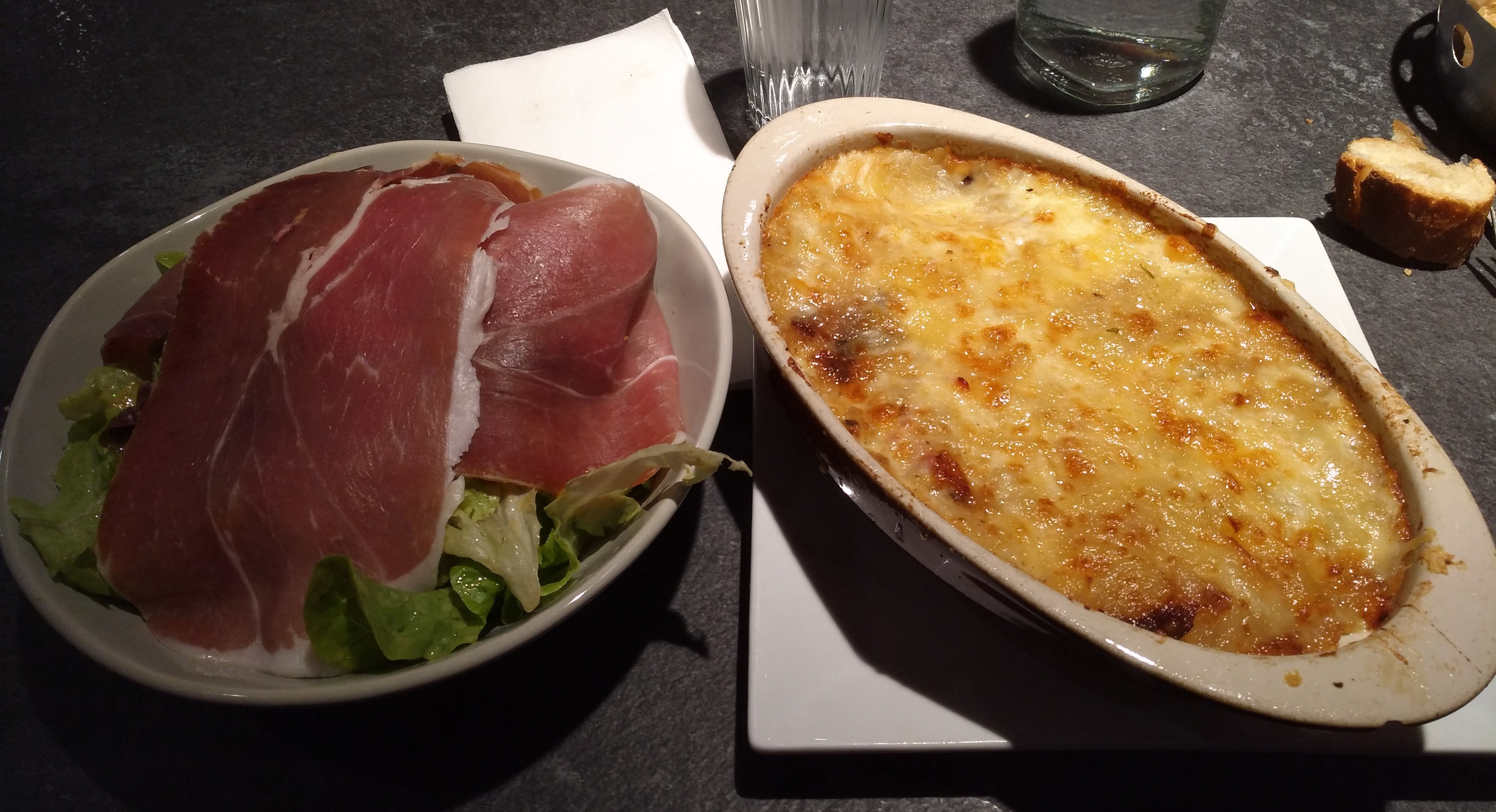 Truffade dégustée au restaurant Le Pile Poêle, à Clermont-Ferrand, en France.